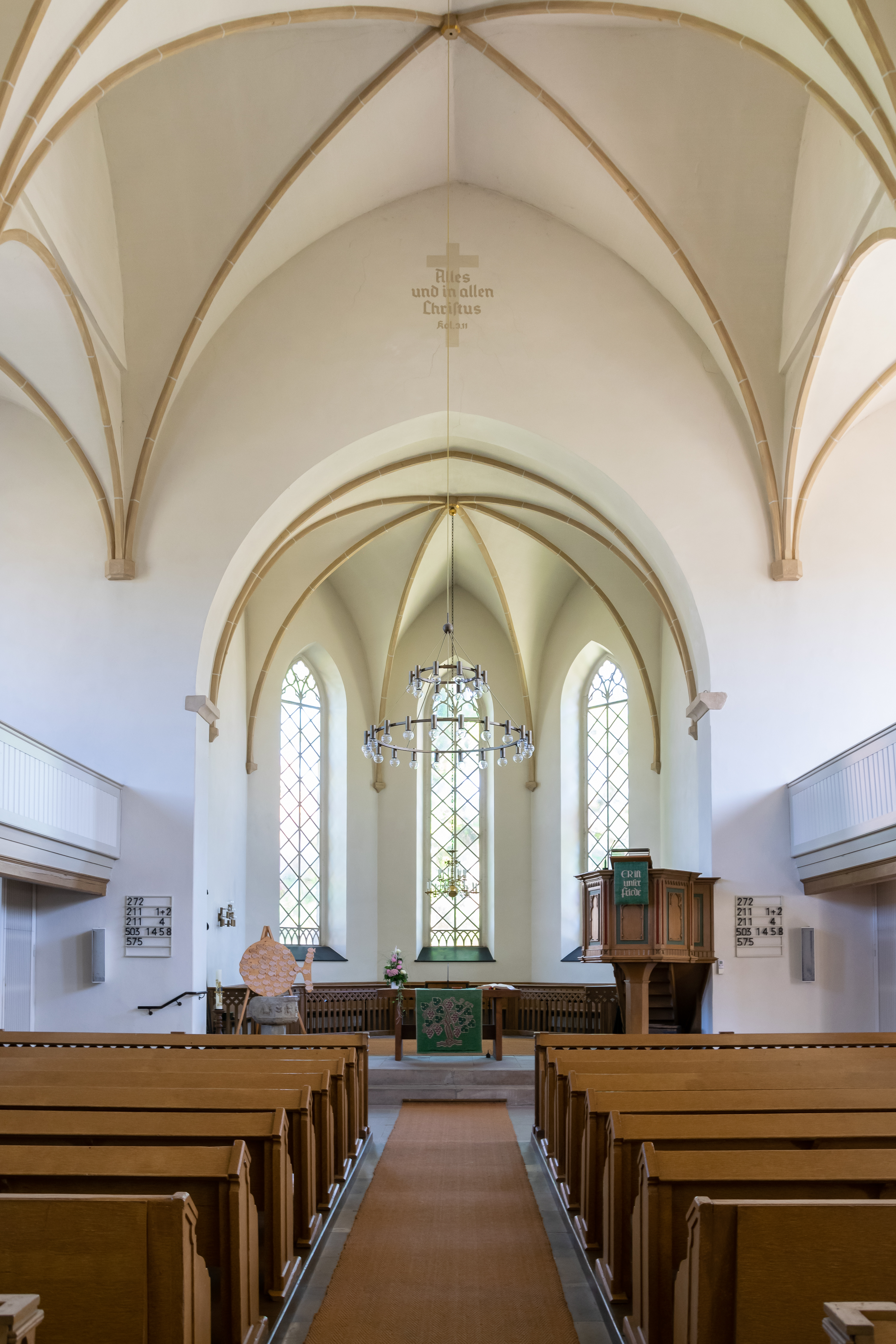 Evangelisch-reformierte Kirche in Dörentrup-Bega; Kirchenschiff